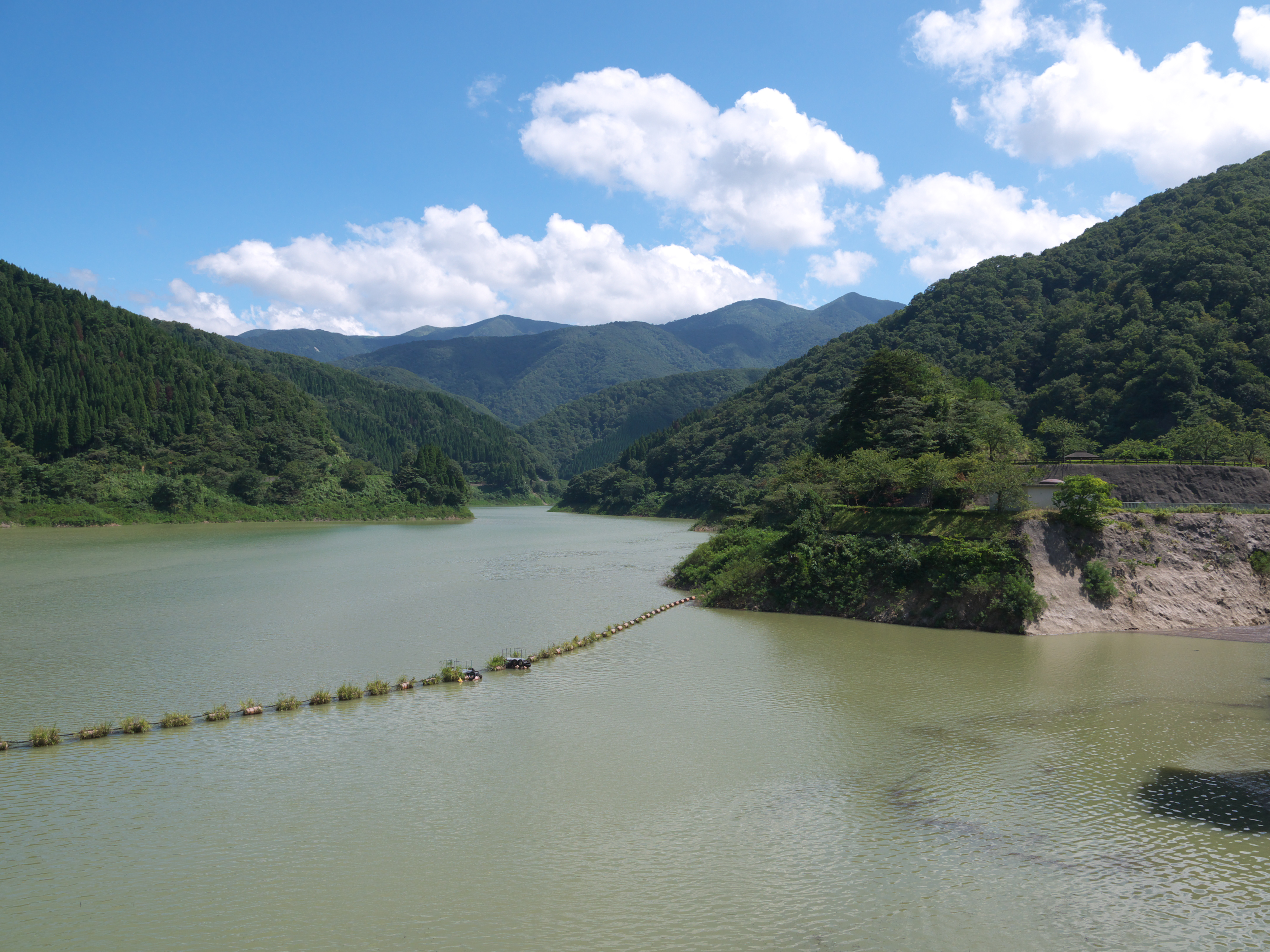 広野ダムと夜叉ヶ池山